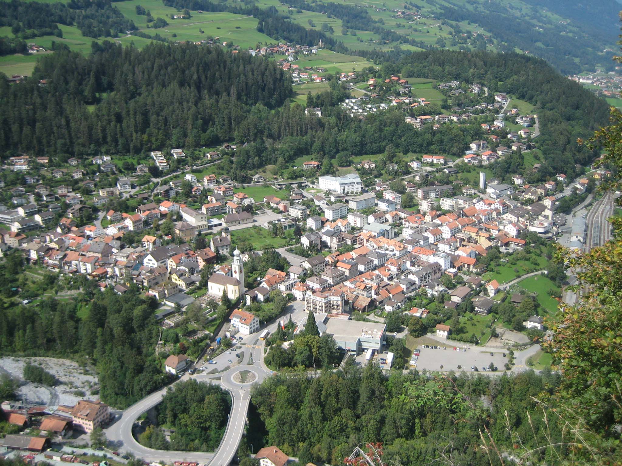 Thusis Richtung NW von der Hohenrätien aus